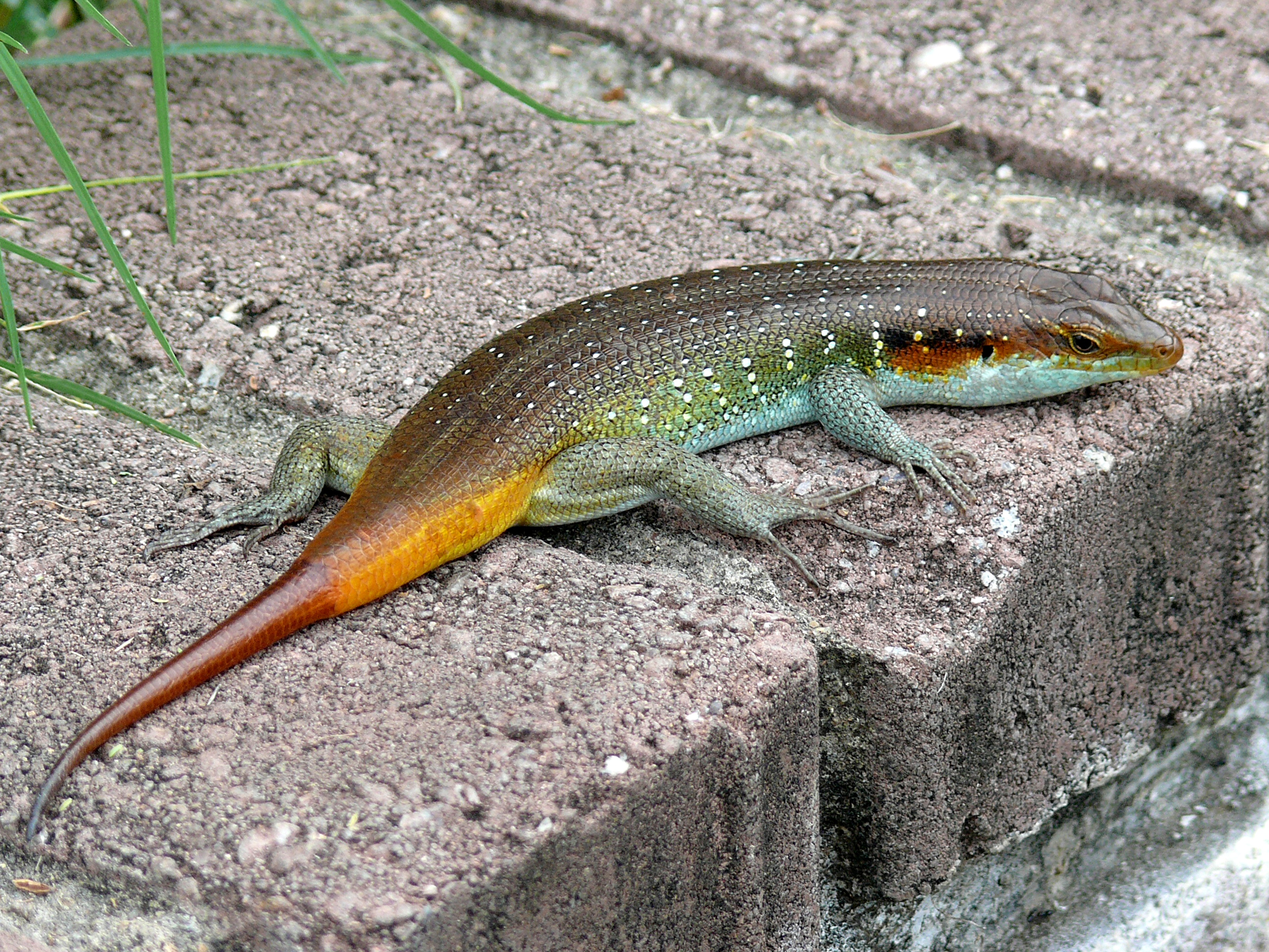 Skukuza Camp, Kruger NP, SOUTH AFRICA